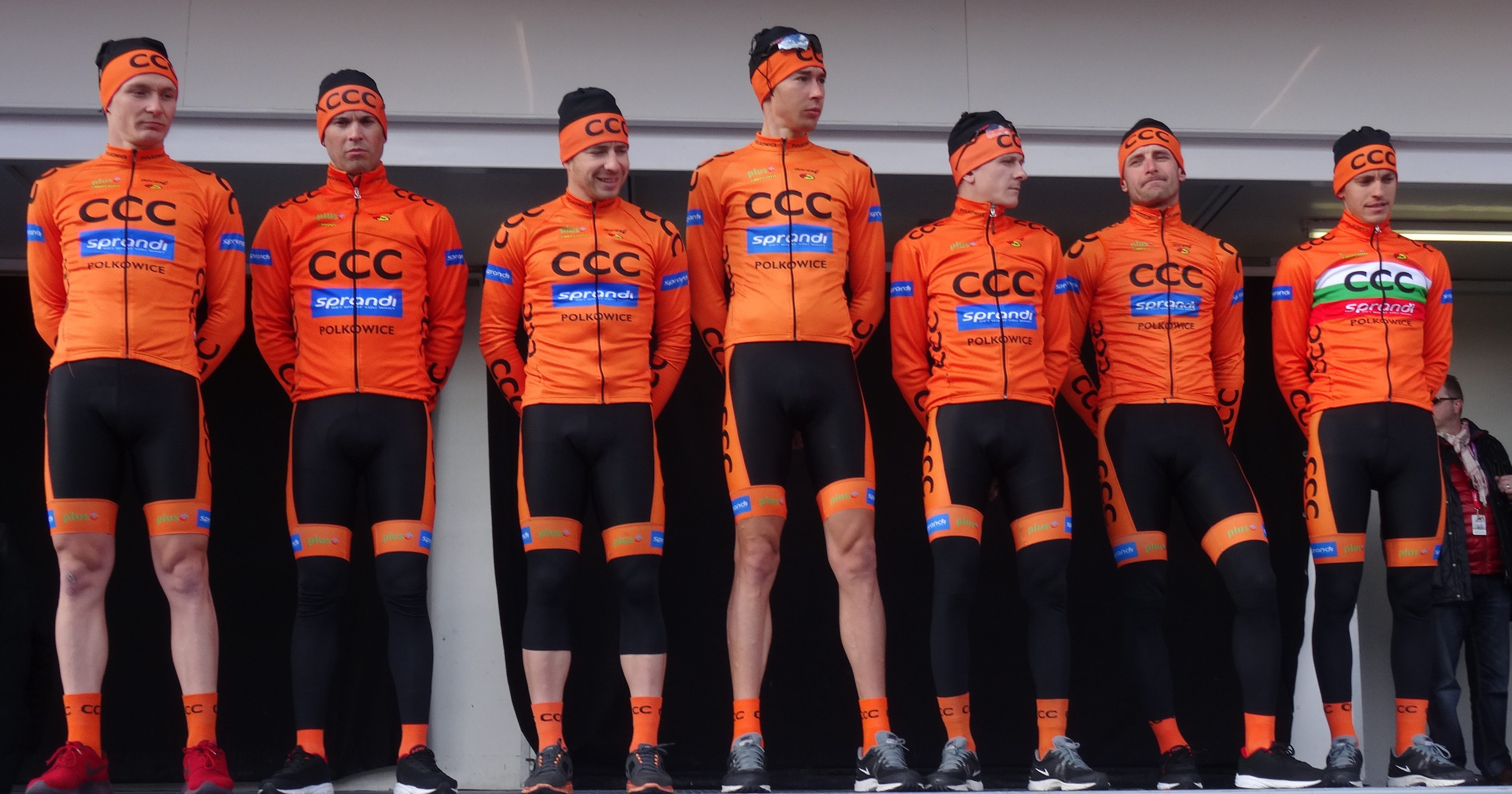 Reportage réalisé le mercredi 4 mars à l'occasion du départ du Samyn des Dames 2015 et du Samyn 2015 à Quaregnon, Belgique.